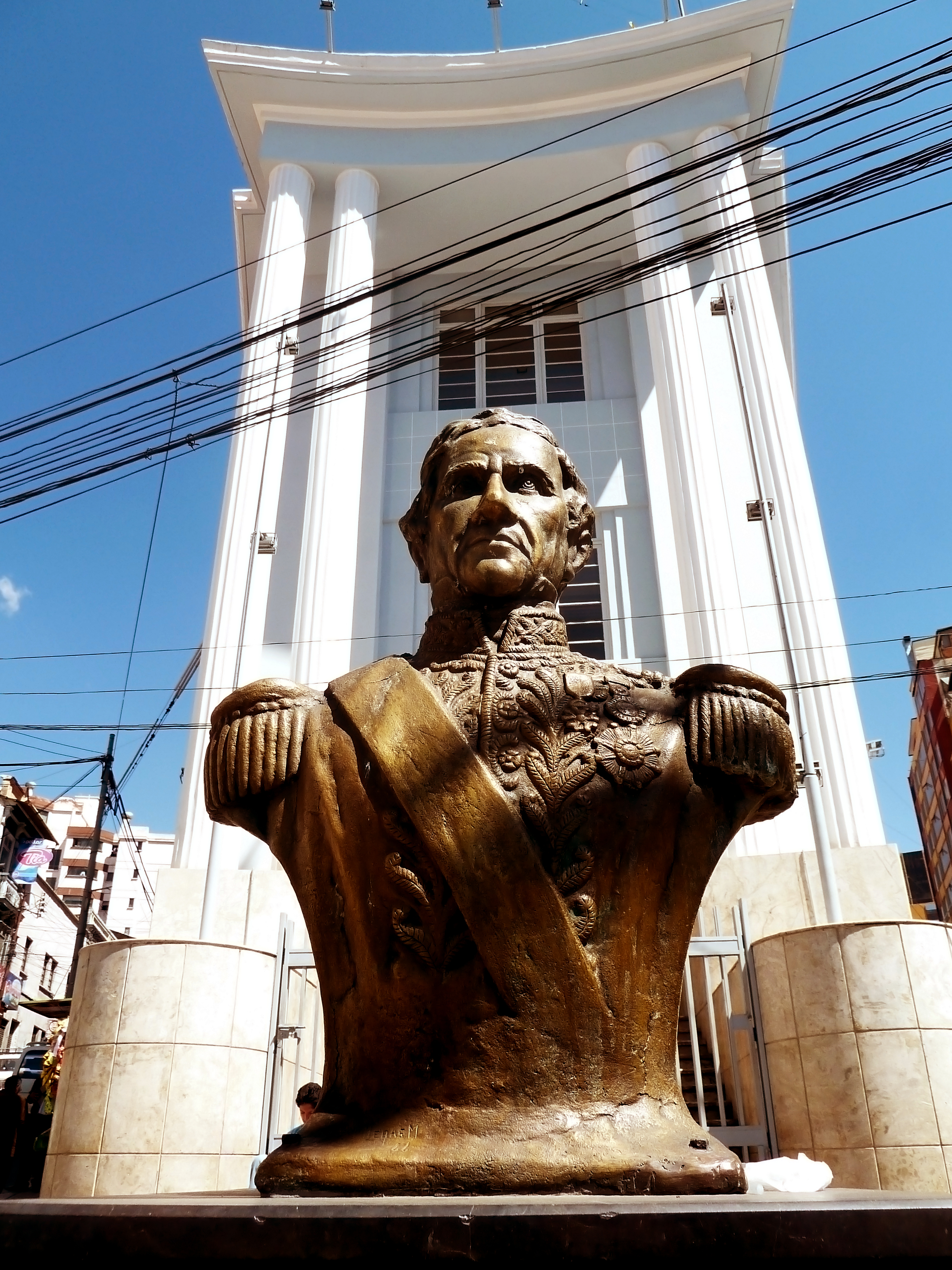 Biblioteca Municipal This medium shows the protected monument with the number L/00-132 in Bolivia.